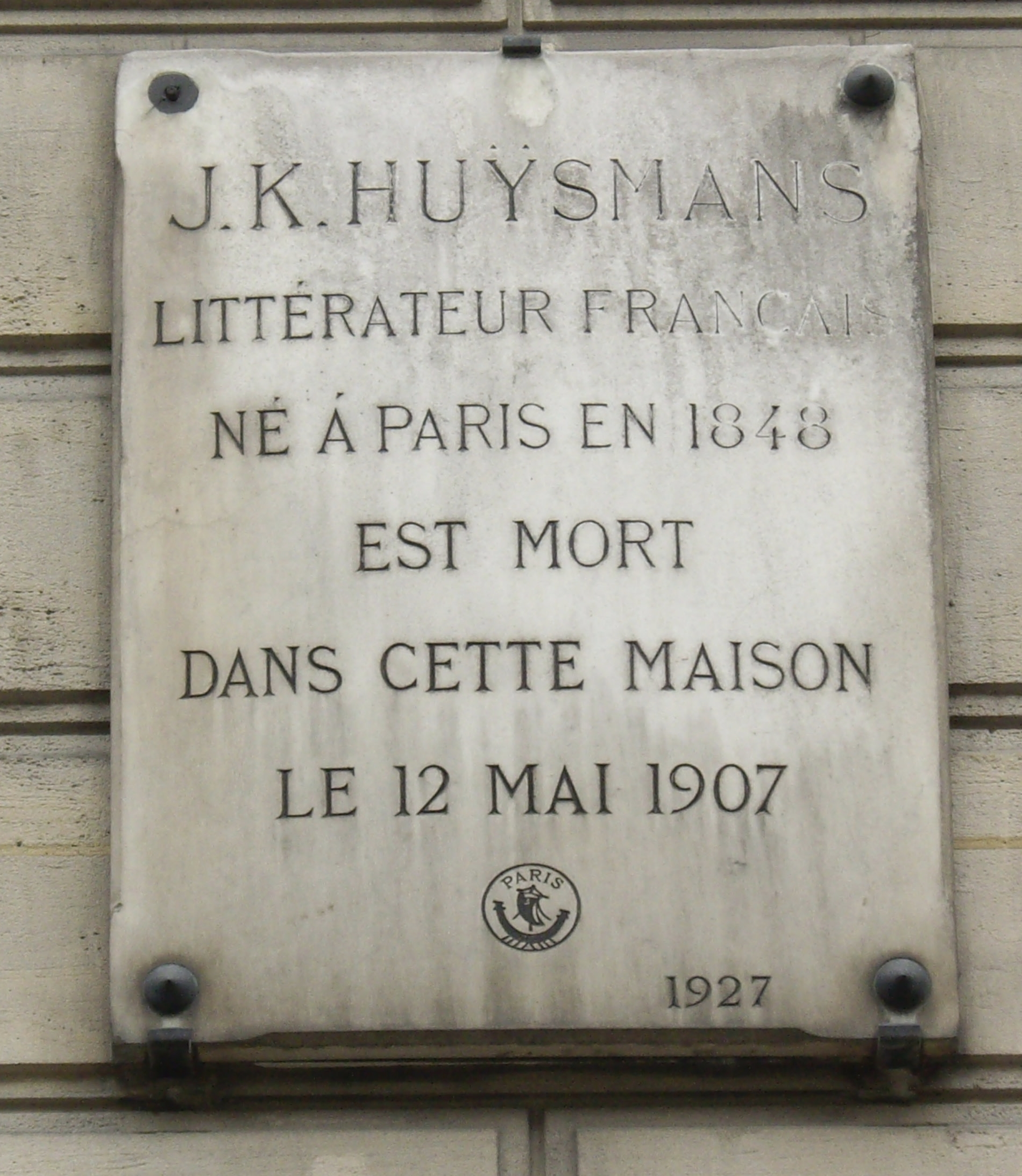 Plaque apposée au n° 31 de la rue Saint-Placide, Paris 6e, où mourut l'écrivain Joris-Karl Huysmans (1848-1907) le 12 mai 1907.